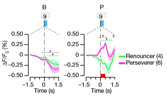 OFC－DSの活動を示している。へこたれないほうが赤、へこたれるほうが緑